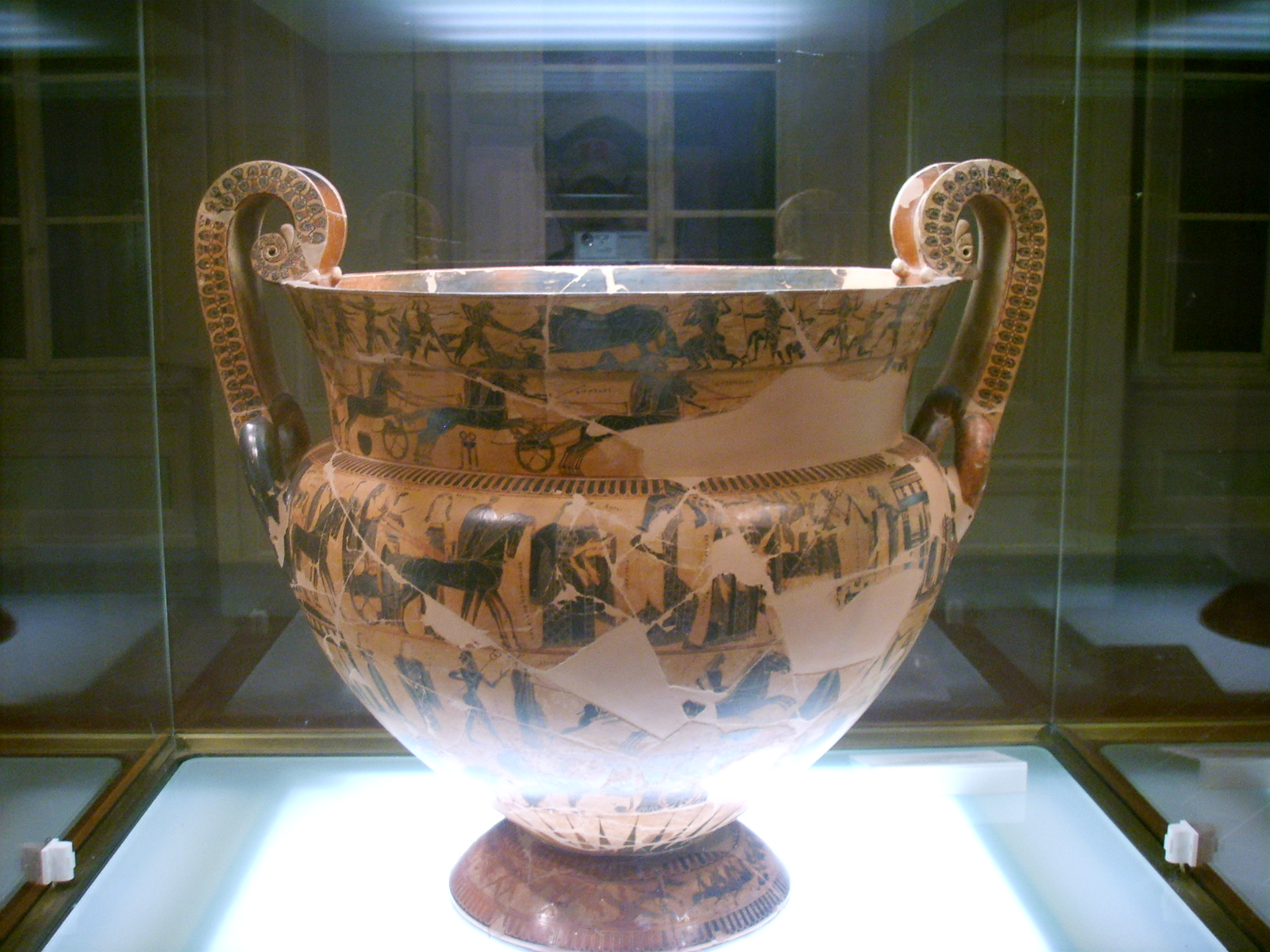 Athenian volute-krater.